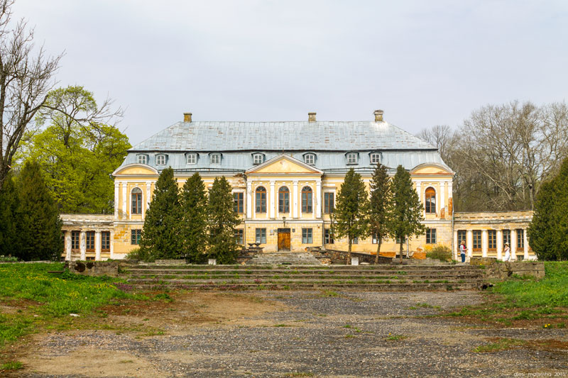 Свяцкі палац.